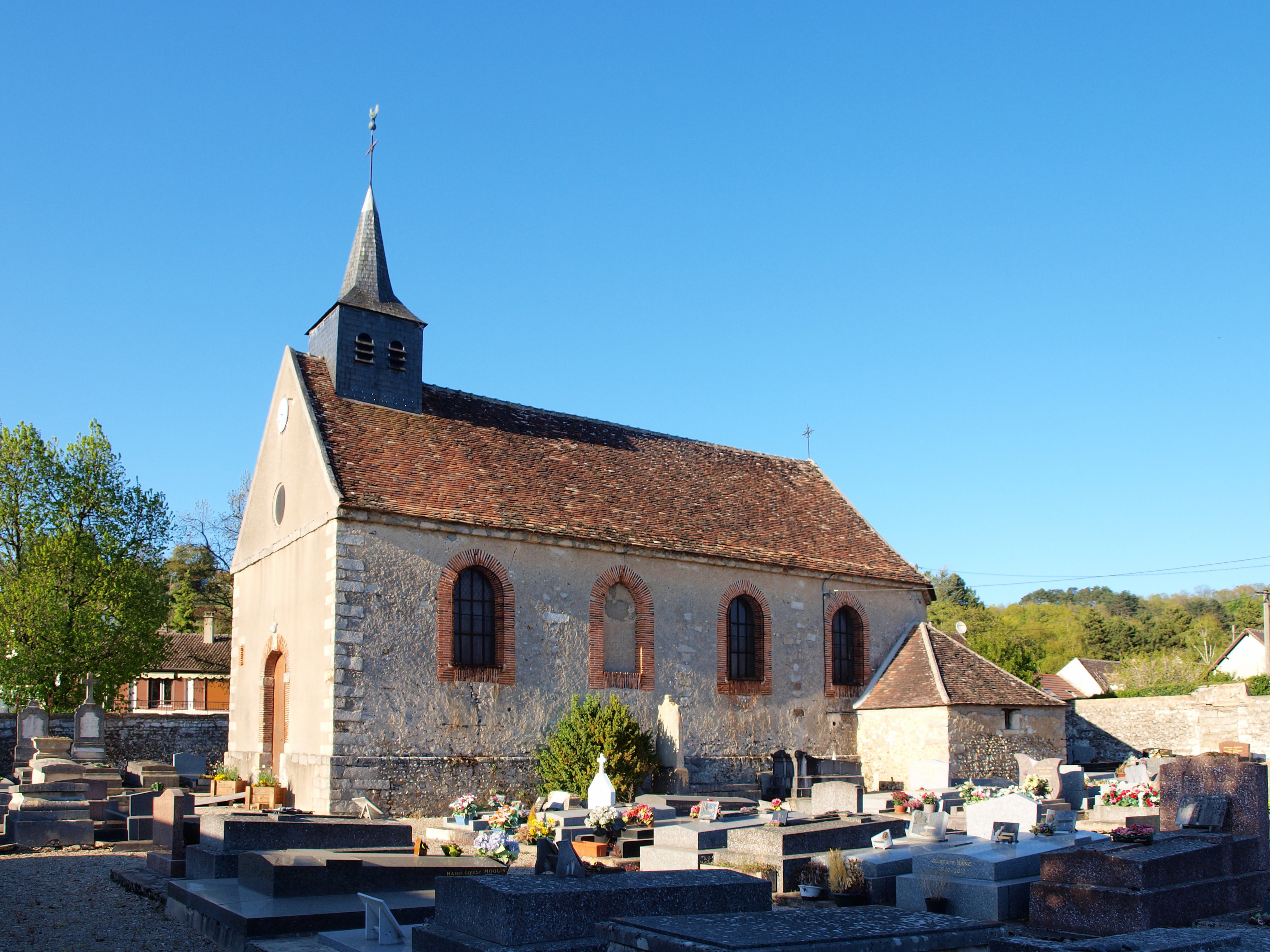 Rosoy (Yonne, France) ; église